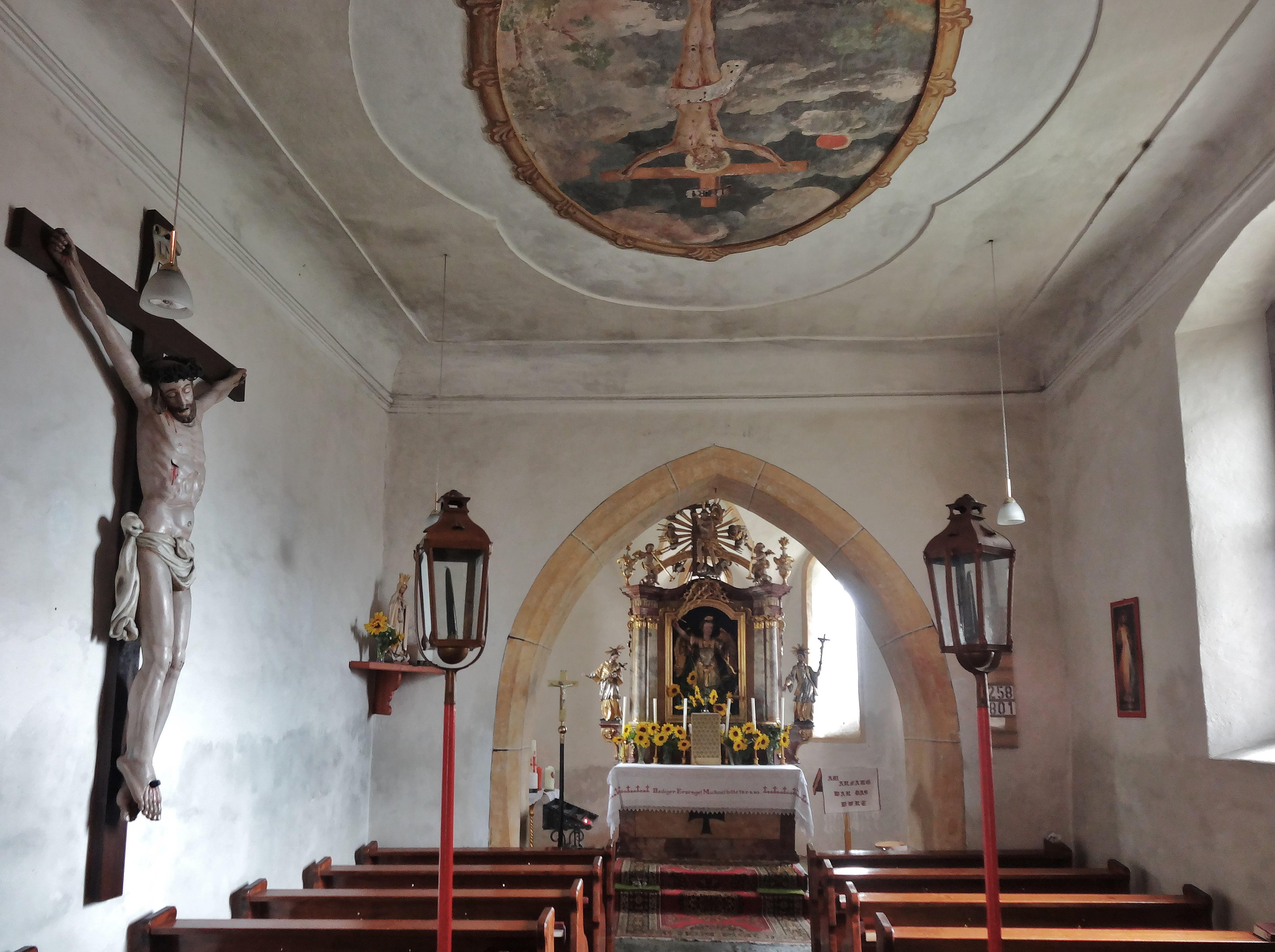 Kath. Filialkirche hl. Michael, Tauchendorf (Glanegg). Innenansicht